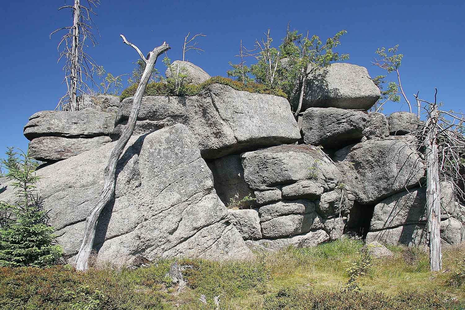 Jizerské hory - Polední kameny, Jizera Mountains, district Liberec, Czech Republic autor: Prazak date: 19. 7. 2006